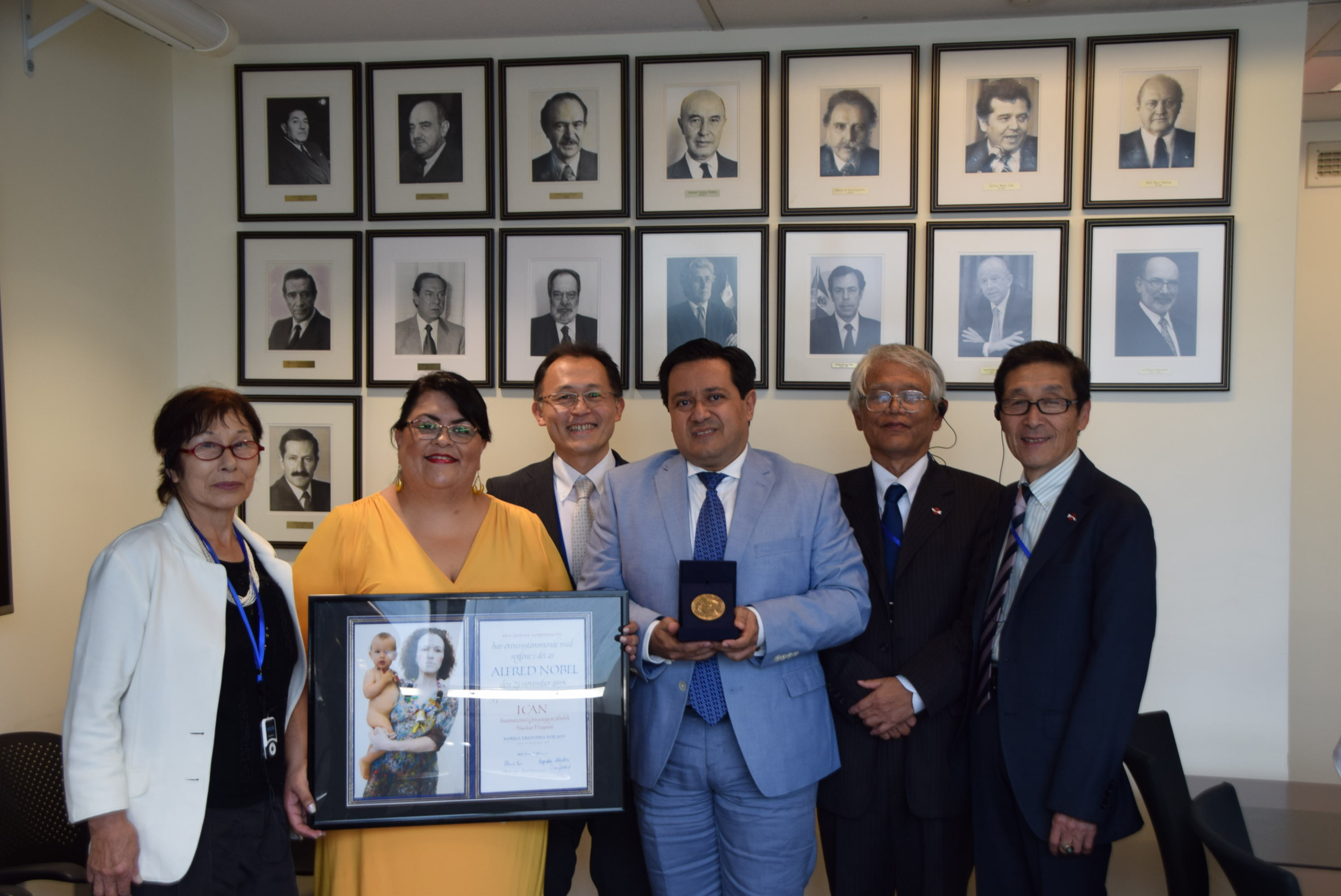 2018年7月12日ニューヨーク寄港時、国連大使館にてメキシコ国連大使との面会。 核兵器禁止条約が制定されるために中心的に動いてくれた国の1つがメキシコ。被爆者と共に、条約制定に尽力してくれた御礼と今後も共に頑張るという話をした。